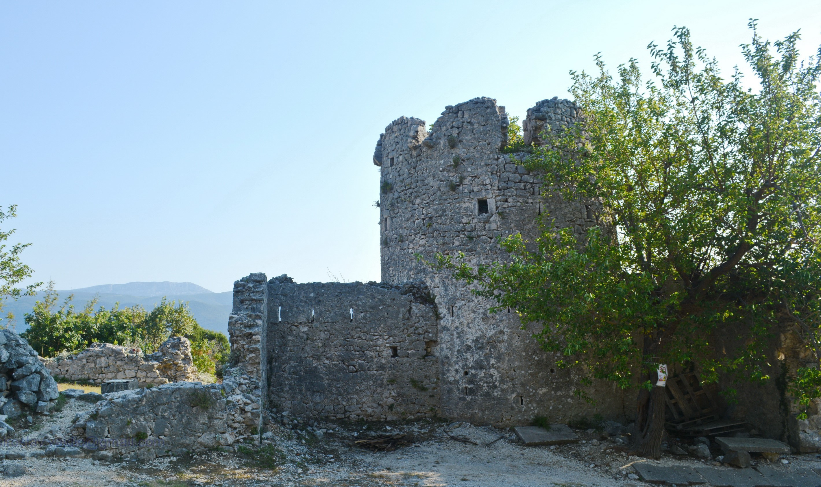 Smrdan grad